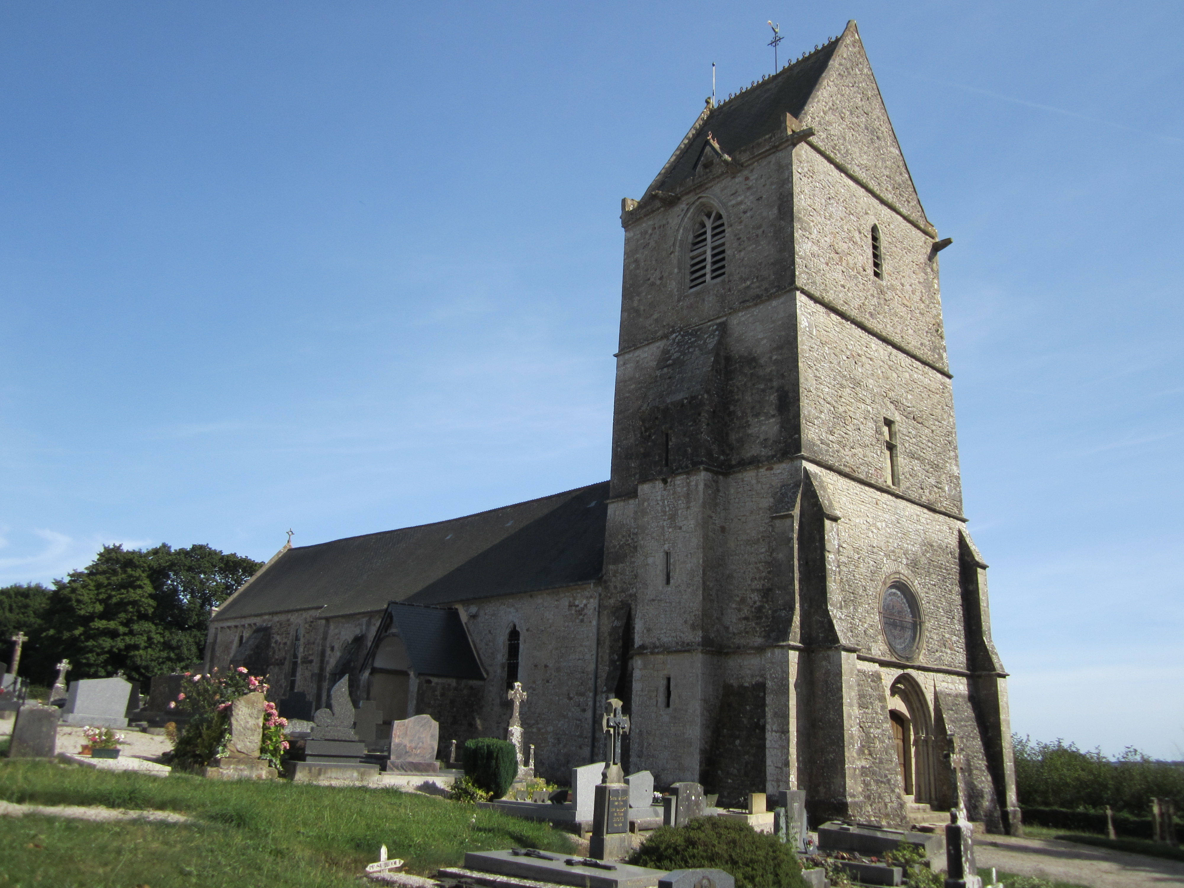 église Notre-Dame de Magneville .